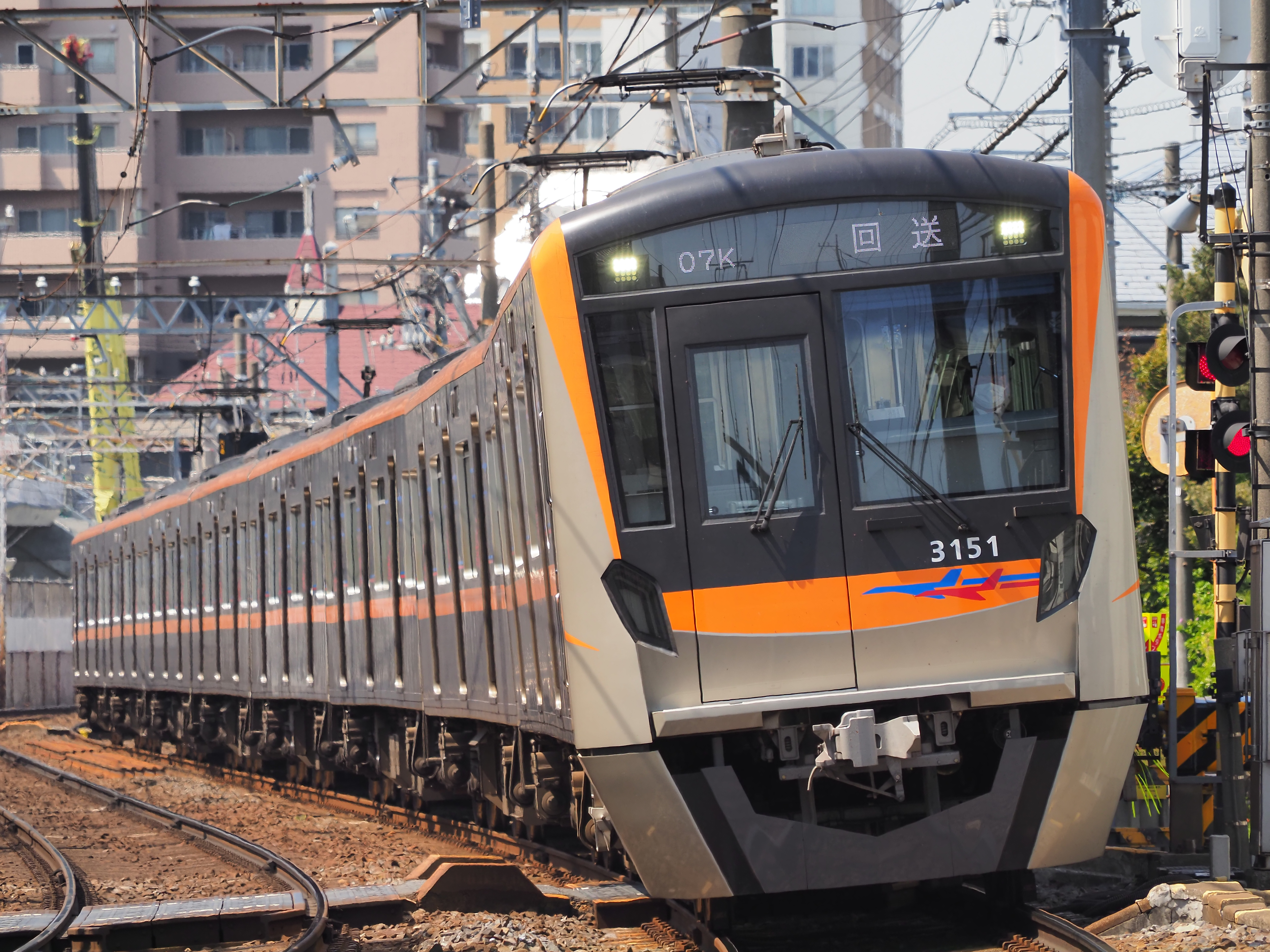 京成3100系3151Fの回送。京成八幡～鬼越間にて